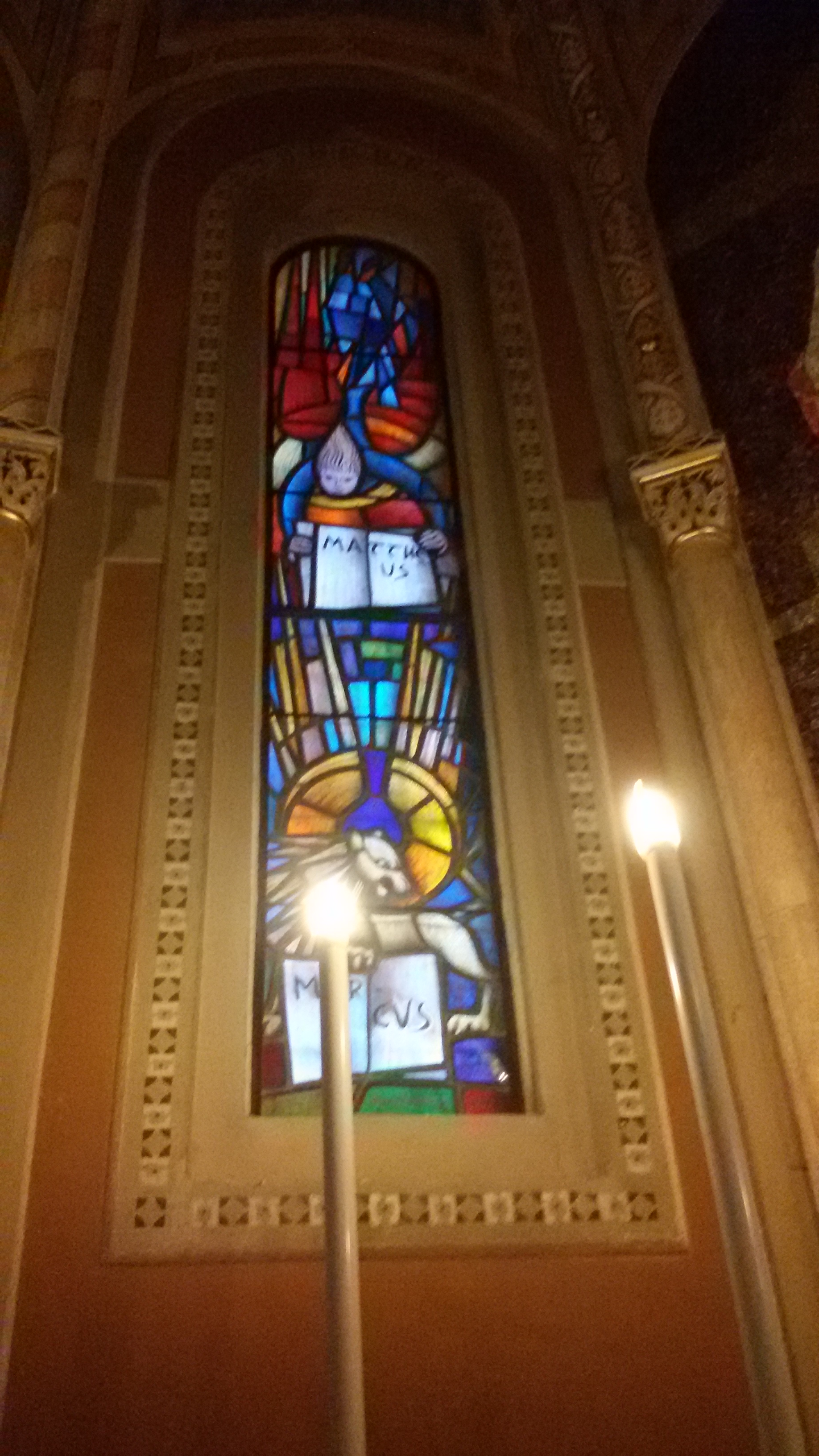 Chiesa di Santa Cristina Quinto di Treviso